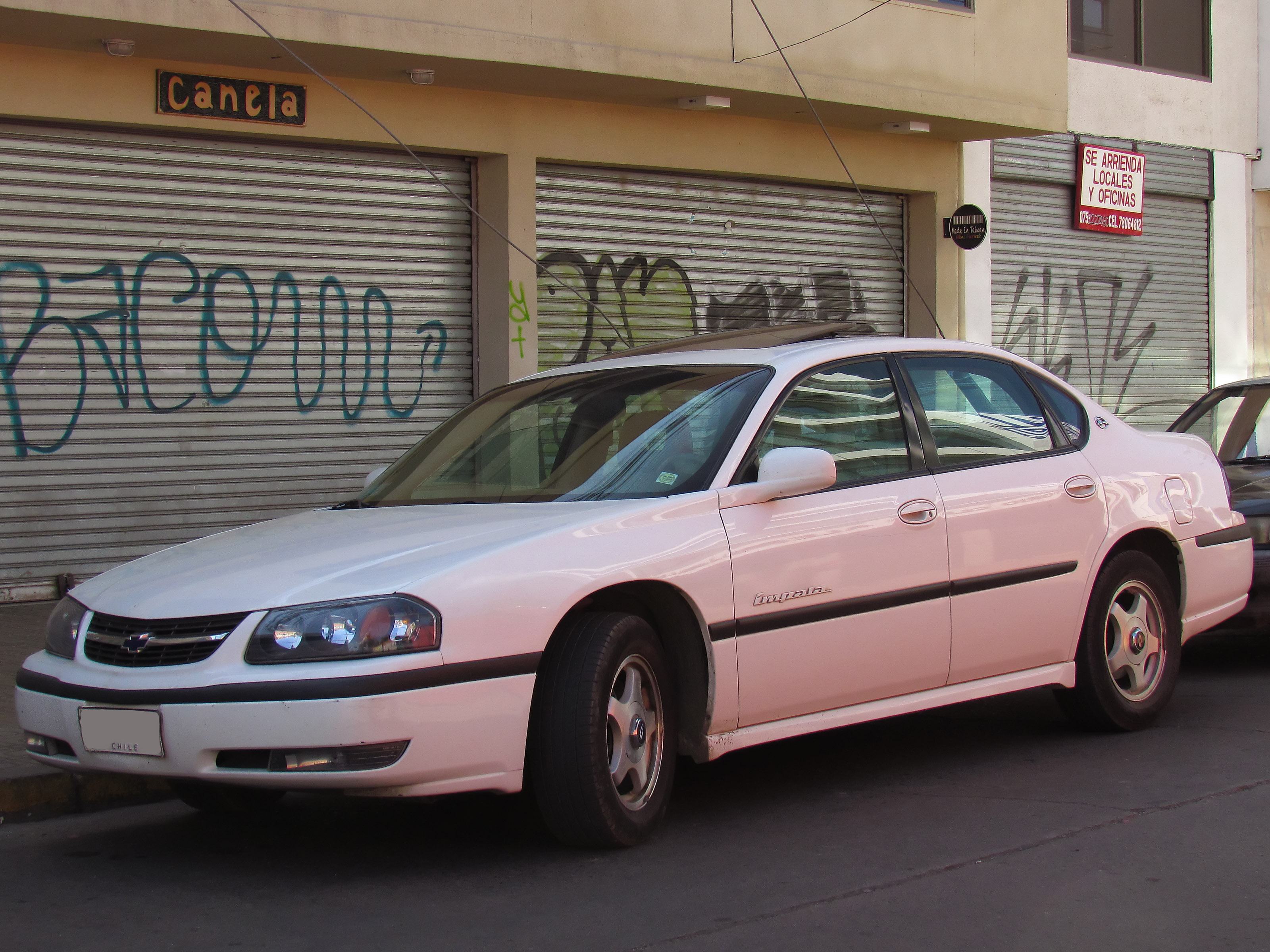 Chevrolet Impala LS 2002